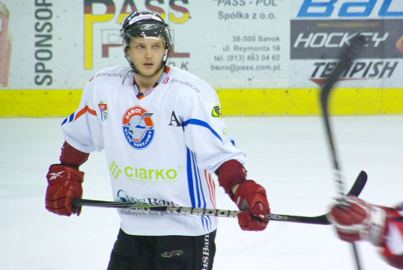 Marcin Kolusz w barwach Ciarko PBS Bank Sanok podczas piątego meczu finałowego o Mistrzostwo Polski 2011/2012 z ComArch Cracovią (Arena Sanok, 14 marca 2012)